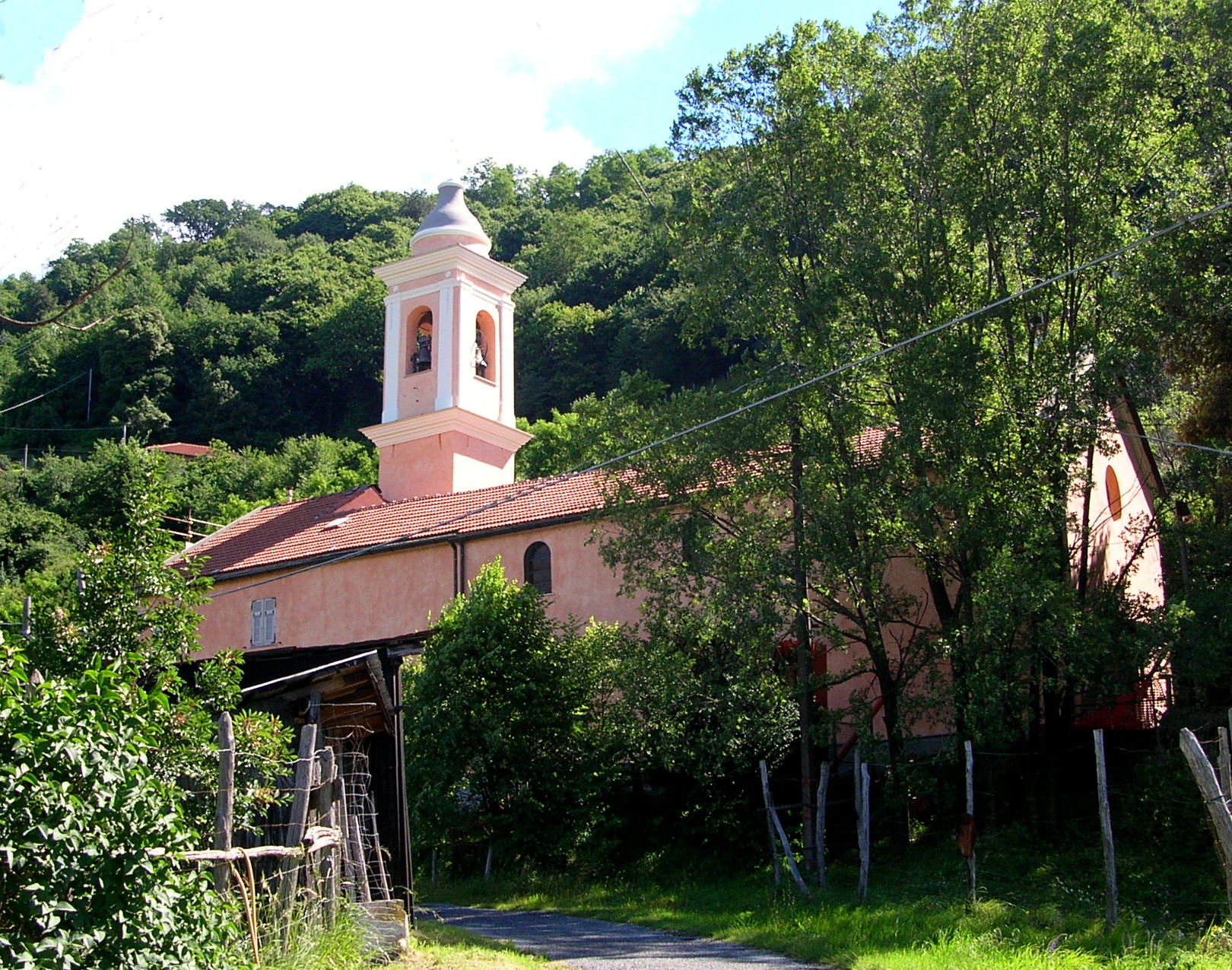 Chiesa di San Pietro ai Prati (Sestri Ponente - Genova)